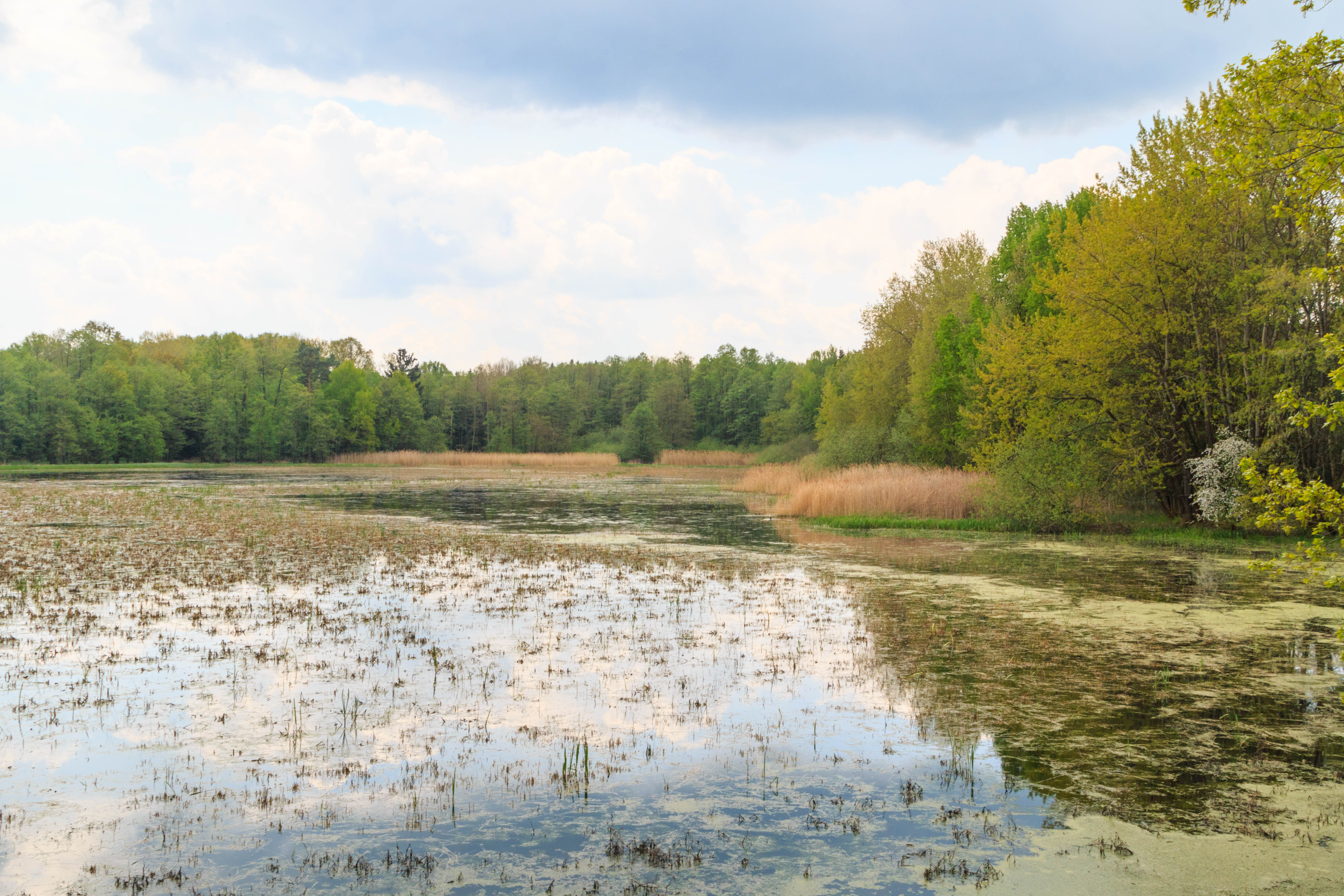 Rybník Nečas u Urbanic Project: Vodstvo.